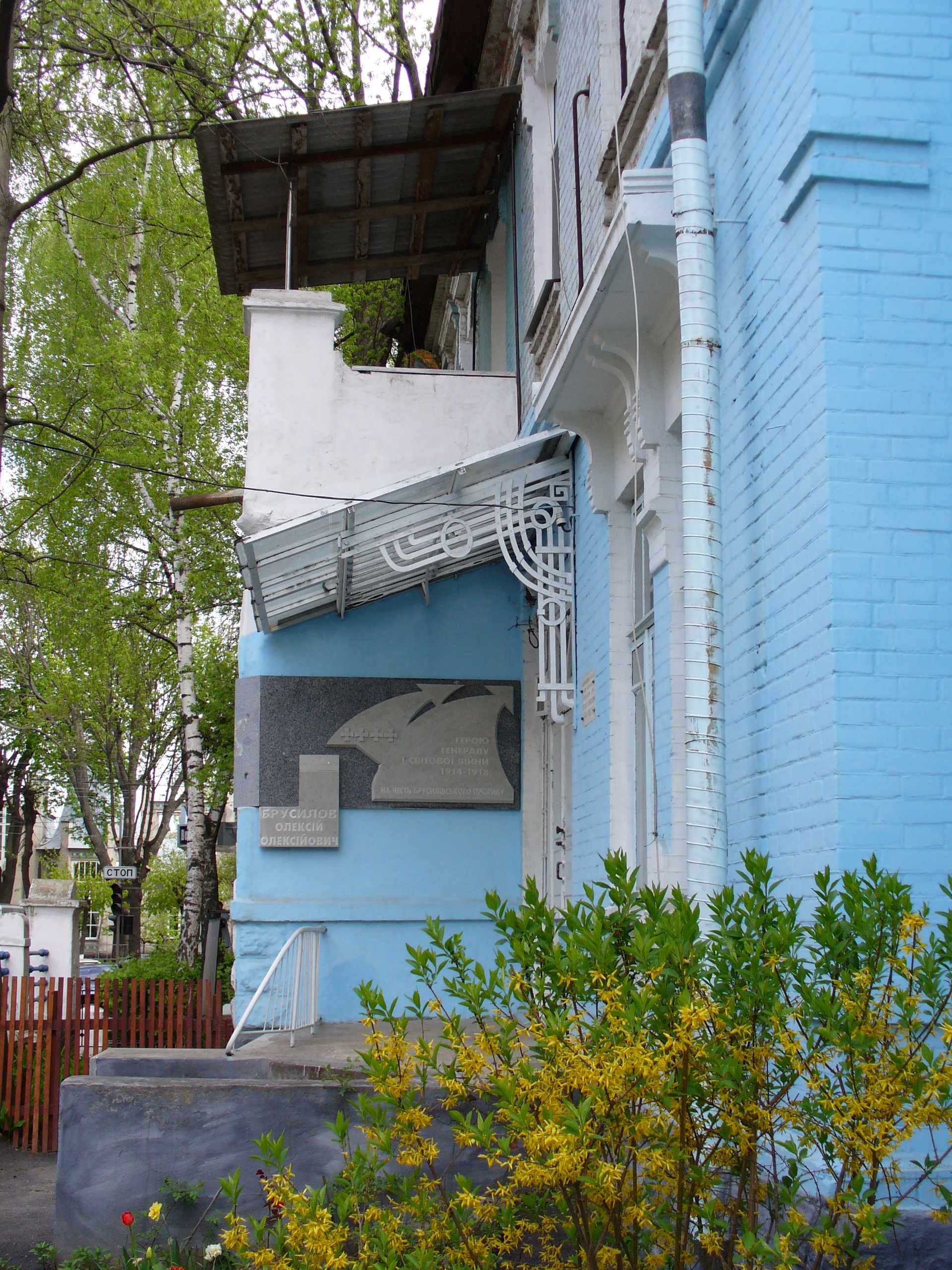 В этом доме проживал генерал Брусилов, Алексей Алексеевич. Украина, г.Винница